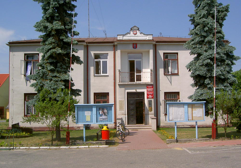 Józefów Biłgorajski, Poland • Urząd Miasta i Gminy (dawny wygląd) / City Council